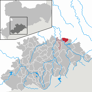 Borstendorf im Erzgebirgskreis, Sachsen